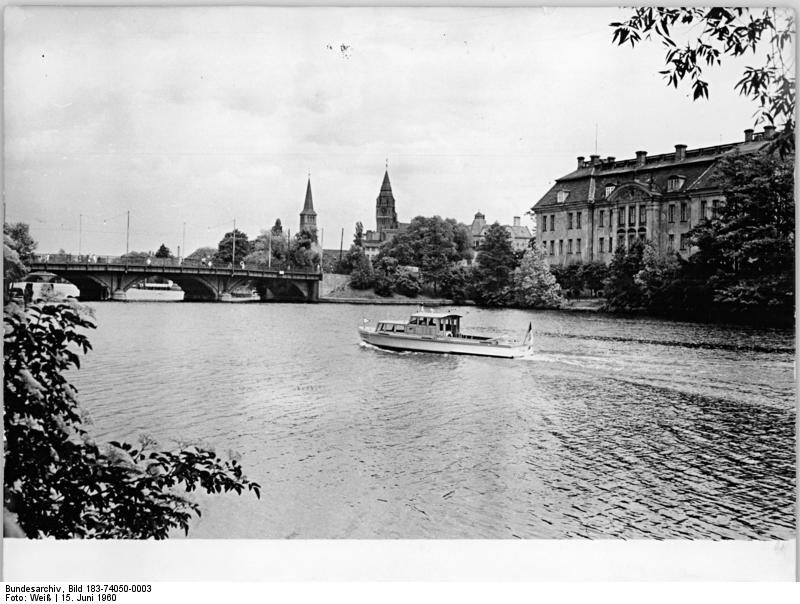 Berlin, Köpenicker Schloss, Dahme, Brücke Zentralbild Weiß-We-Noa-15.6.1960 Die Dahme bei Köpenick…mit dem Schloß (im Hintergrund rechts) , der Wirkungsstätte des Staatlichen Volkskunstensembles.